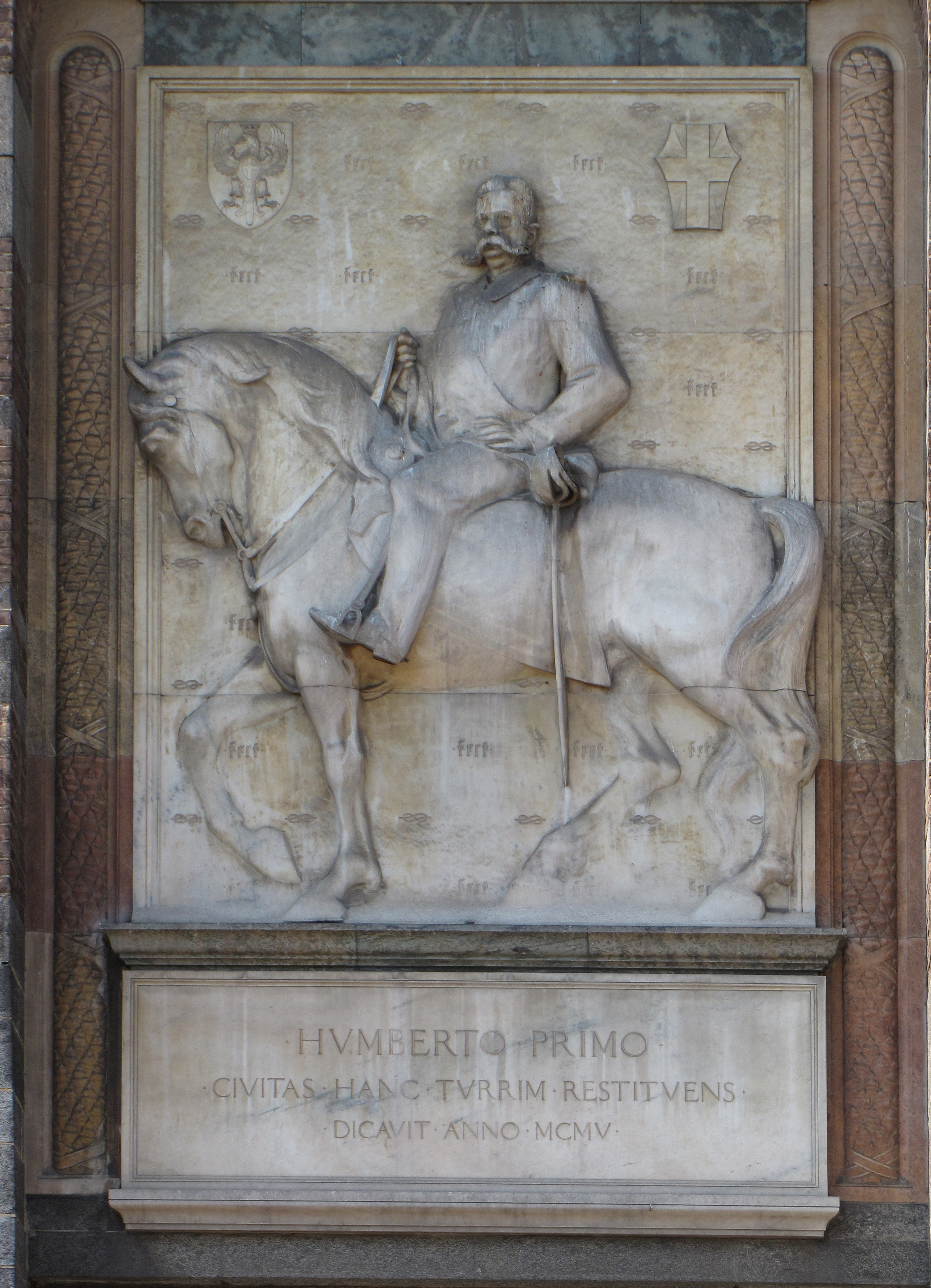 Relief van (H)umberto I op Castello Sforzesco in Milan, crop van foto genomen op 19 augustus 2009